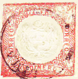 Un dinero rojo 1862-63. Colección propia.